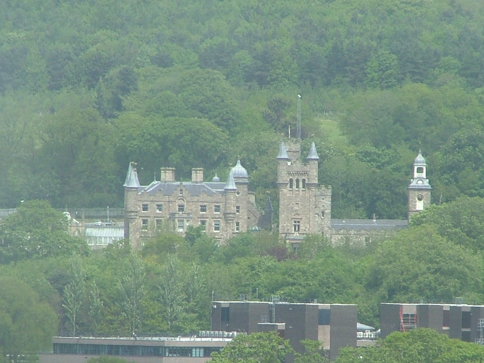 Photo du château de Stormont, bâtiment officiel de l'exécutif nord-irlandais, dans l'est de Belfast.